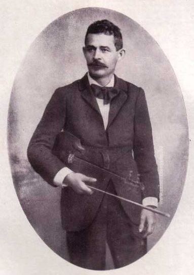 Dankó Pista portréja (Szeged-Fölsőtanya (ma: Szatymaz), 1858. június 14. – Budapest, 1903. március 29.) cigány származású magyar nótaszerző.